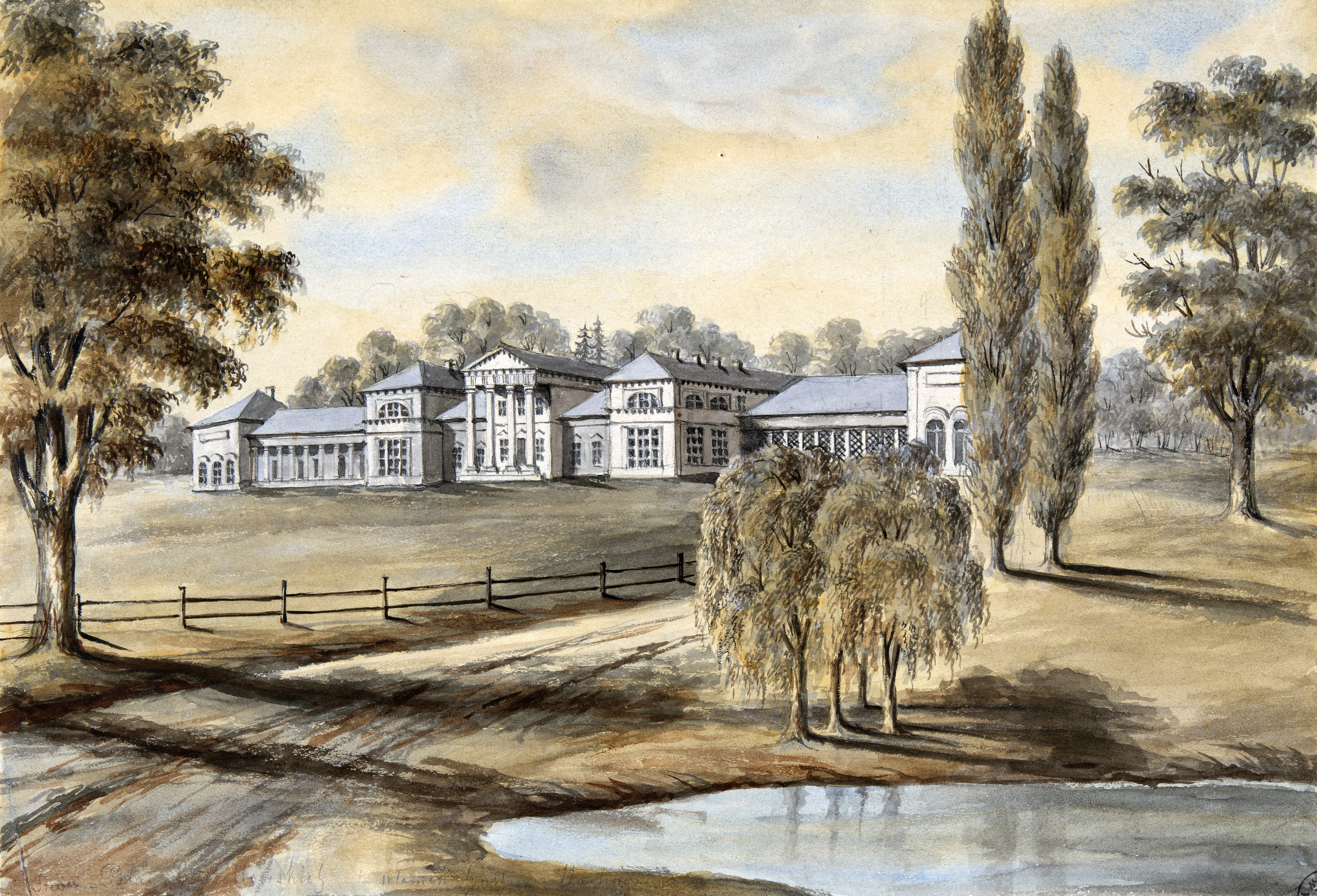 Беларуская (тарашкевіца): Сноў (Snoŭ), сядзіба Рдултоўскіх (Rdułtoŭski)